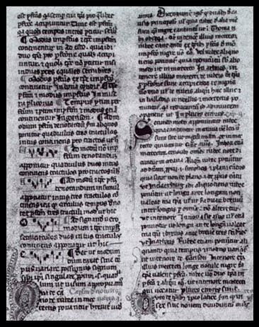 ukázka z traktátu Philippa de Vitry "Ars nova"